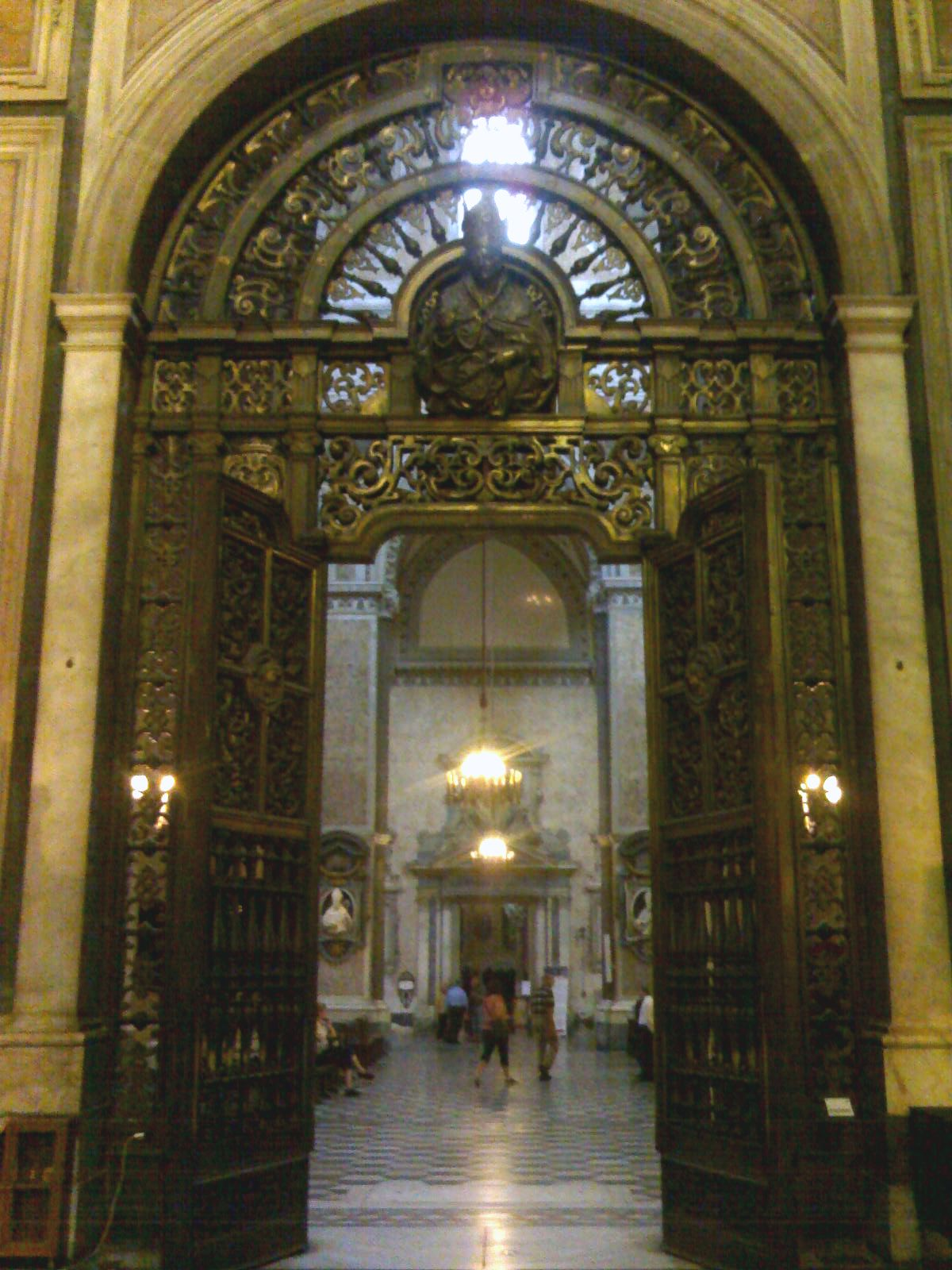 Cancello di Cosimo Fanzago - Cappella del tesoro di San Gennaro (duomo di Napoli)